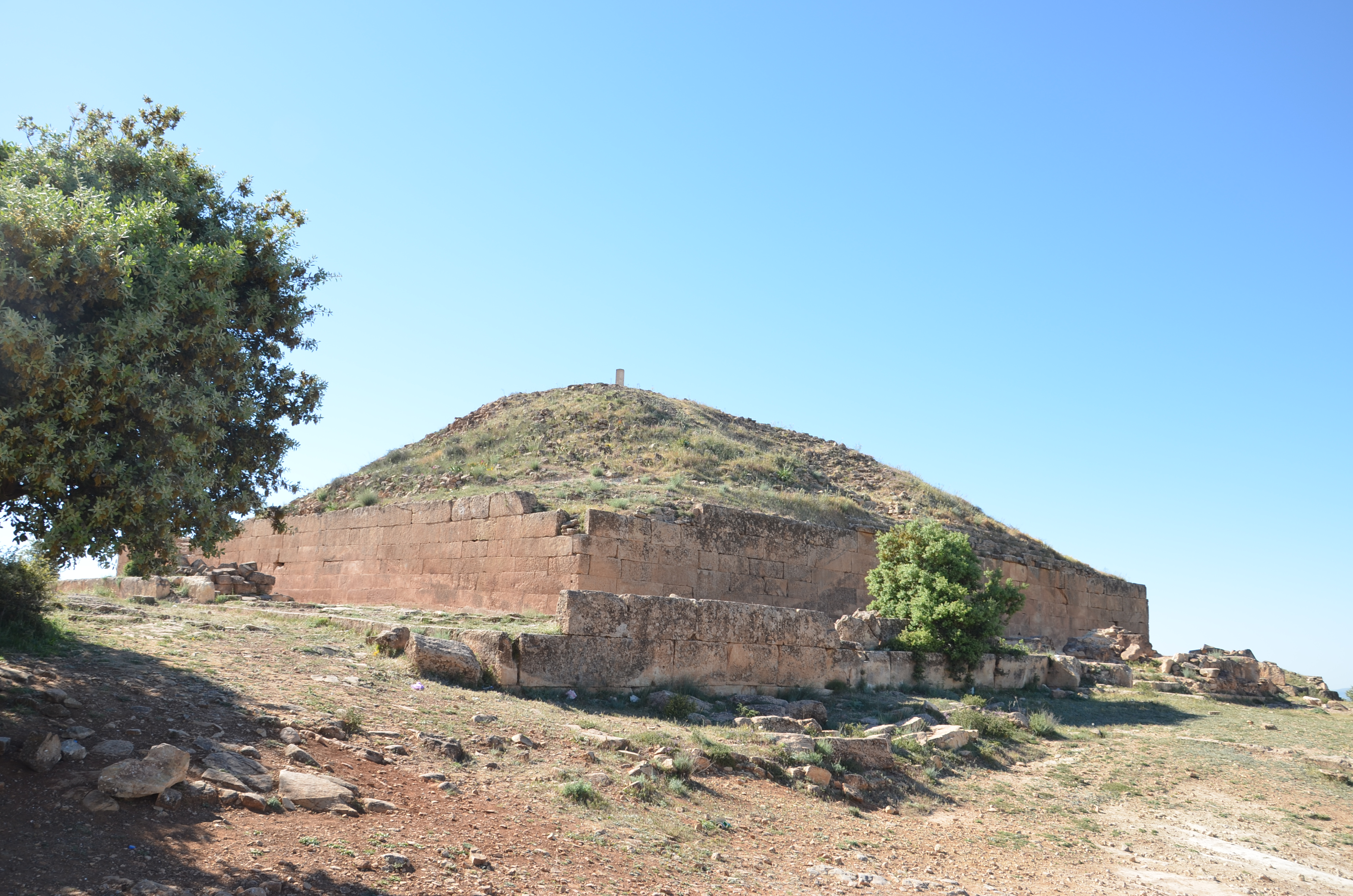 À l'époque qui s'étend de 429 à 671, c'est-à-dire du départ des Romains jusqu'à l'invasion Arabe, il y avait, dans l'Ouest algérien, des roitelets à la tête de principautés. Tels seraient les rois berbères enterrés dans les Djeddars près de Frenda et dont la capitale parait avoir été Tsinouna